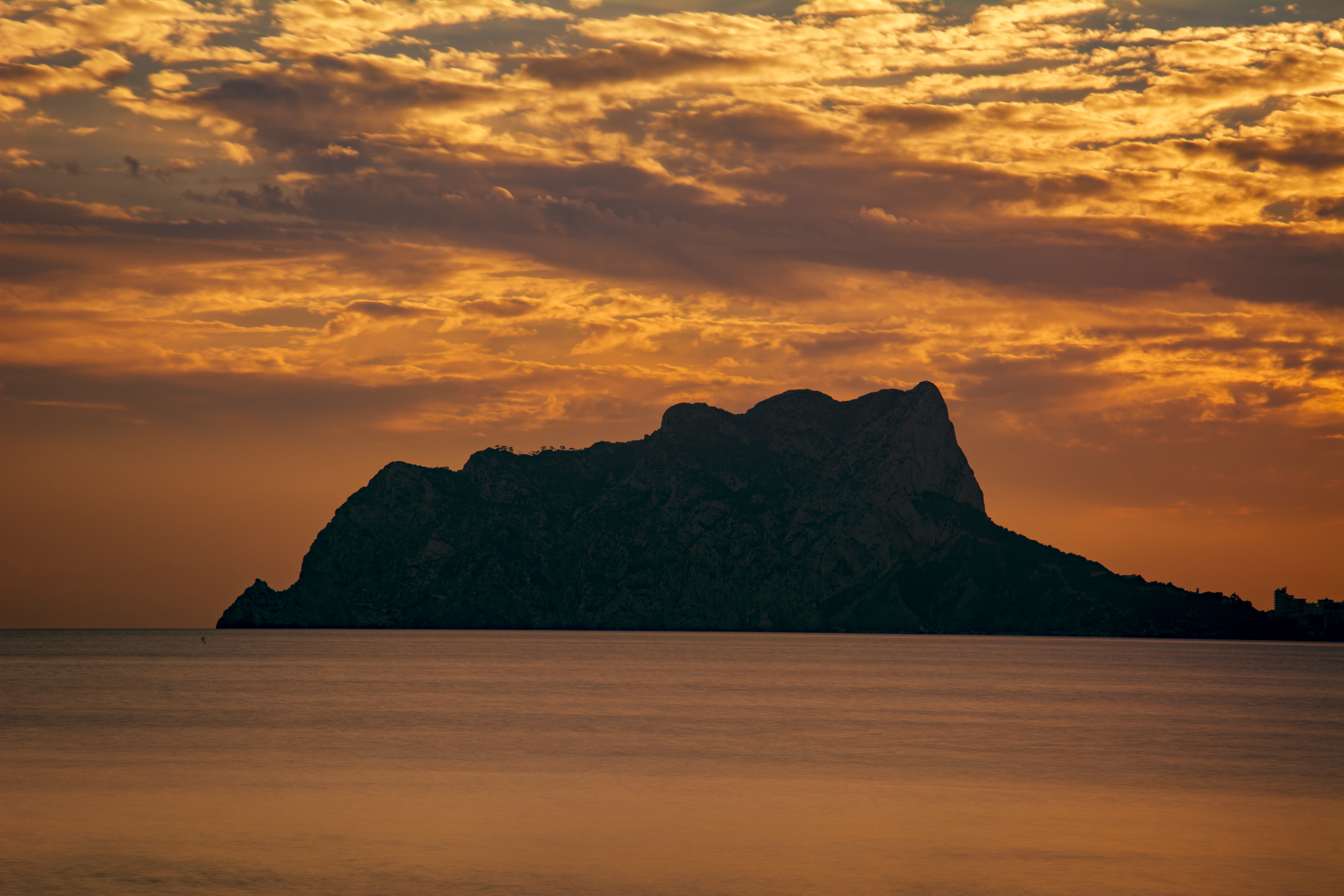 LIC ES5211009 - PN Peñon de Ifach desde Morarira (Atardecer) This is a photography of a Special Area of Conservation in Spain with the ID: ES5211009. Natura2000 entry, EEA entry